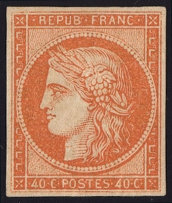 40 centimes type Cérès / 1849 1850 / 3e stamp of France